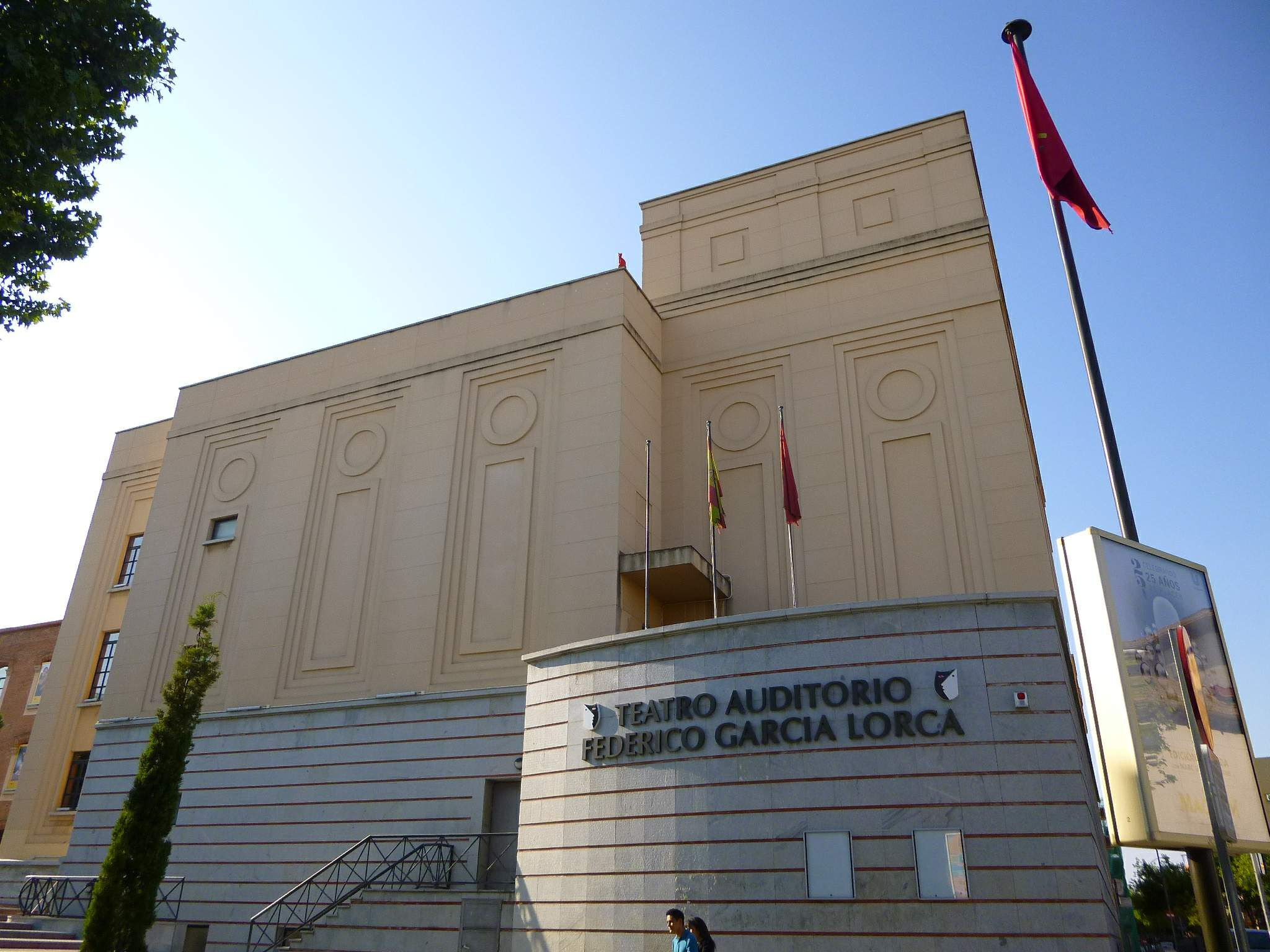 Teatro Auditorio Federico García Lorca (Getafe)